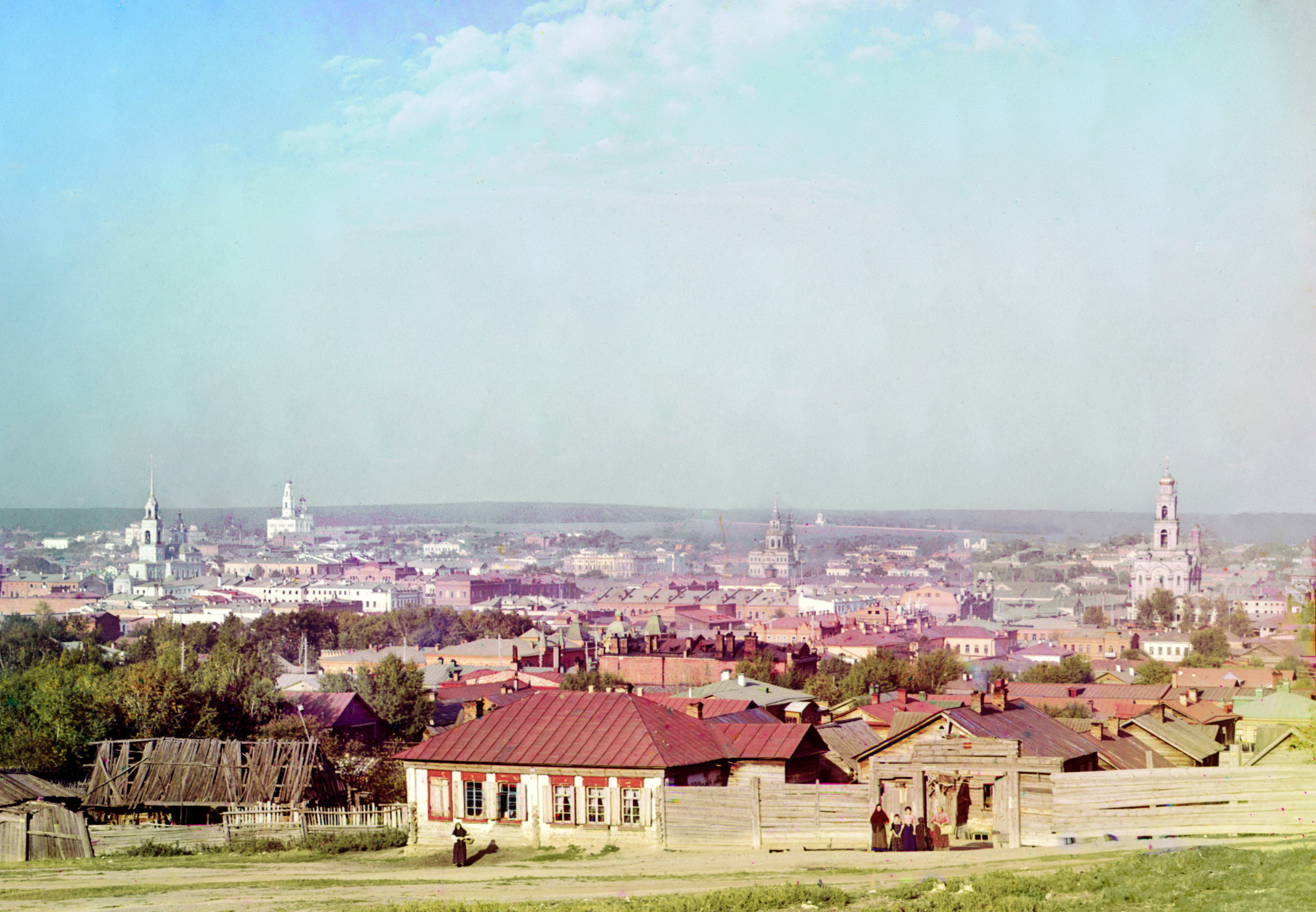 Вид на центральную часть Екатеринбурга начала 20 века. Автор фото - С.М.Прокудин-Горский